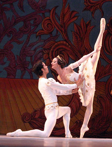 Ballet en el Teatro Teresa Carreño, Caracas, Venezuela